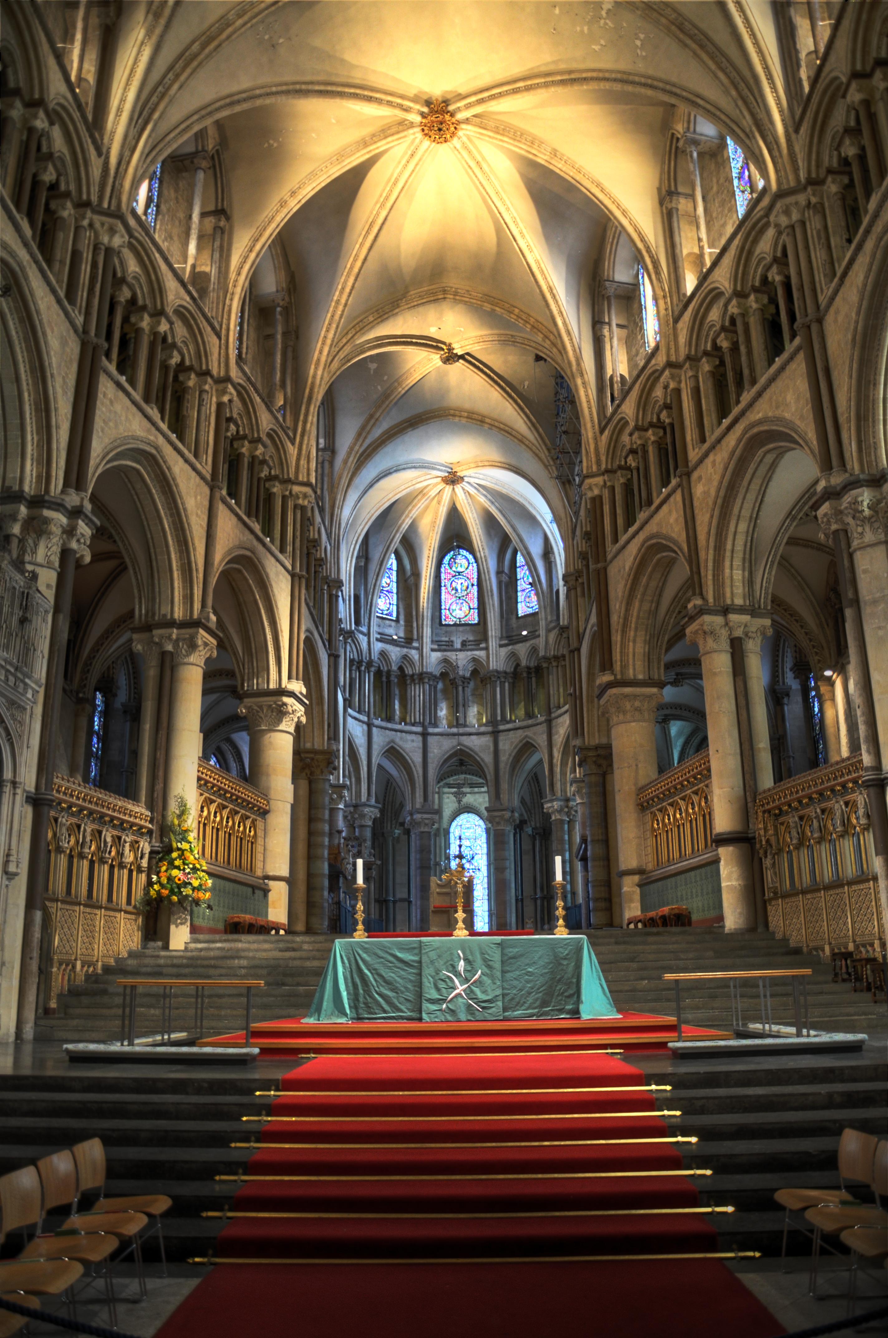 Altarraum in der Kathedrale von Canterbury